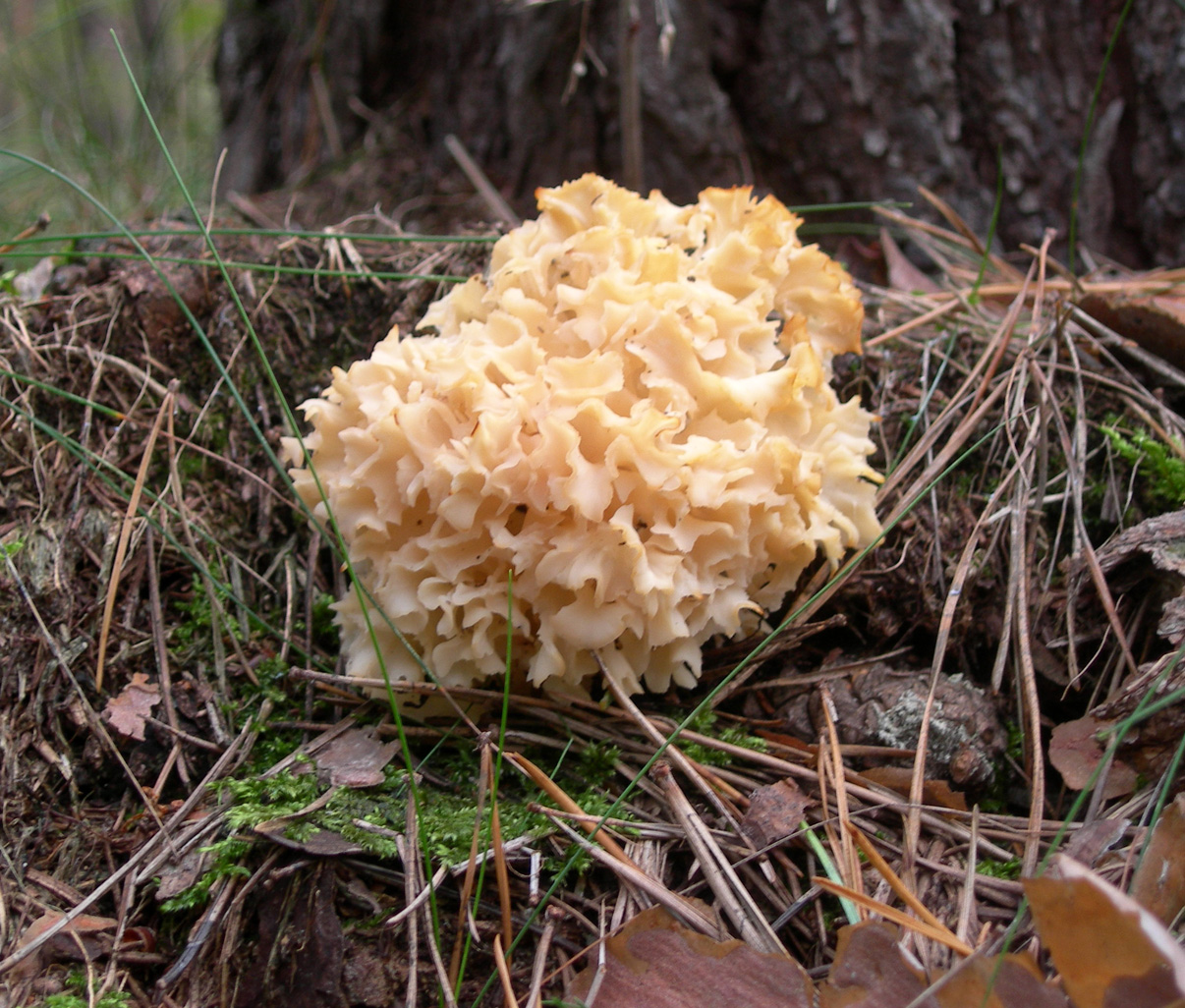 Krause Glucke (Sparassis crispa)